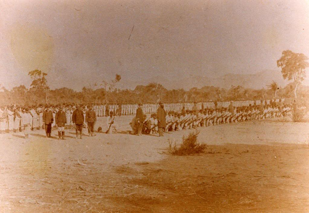 Regimiento Esmeralda en Tacna